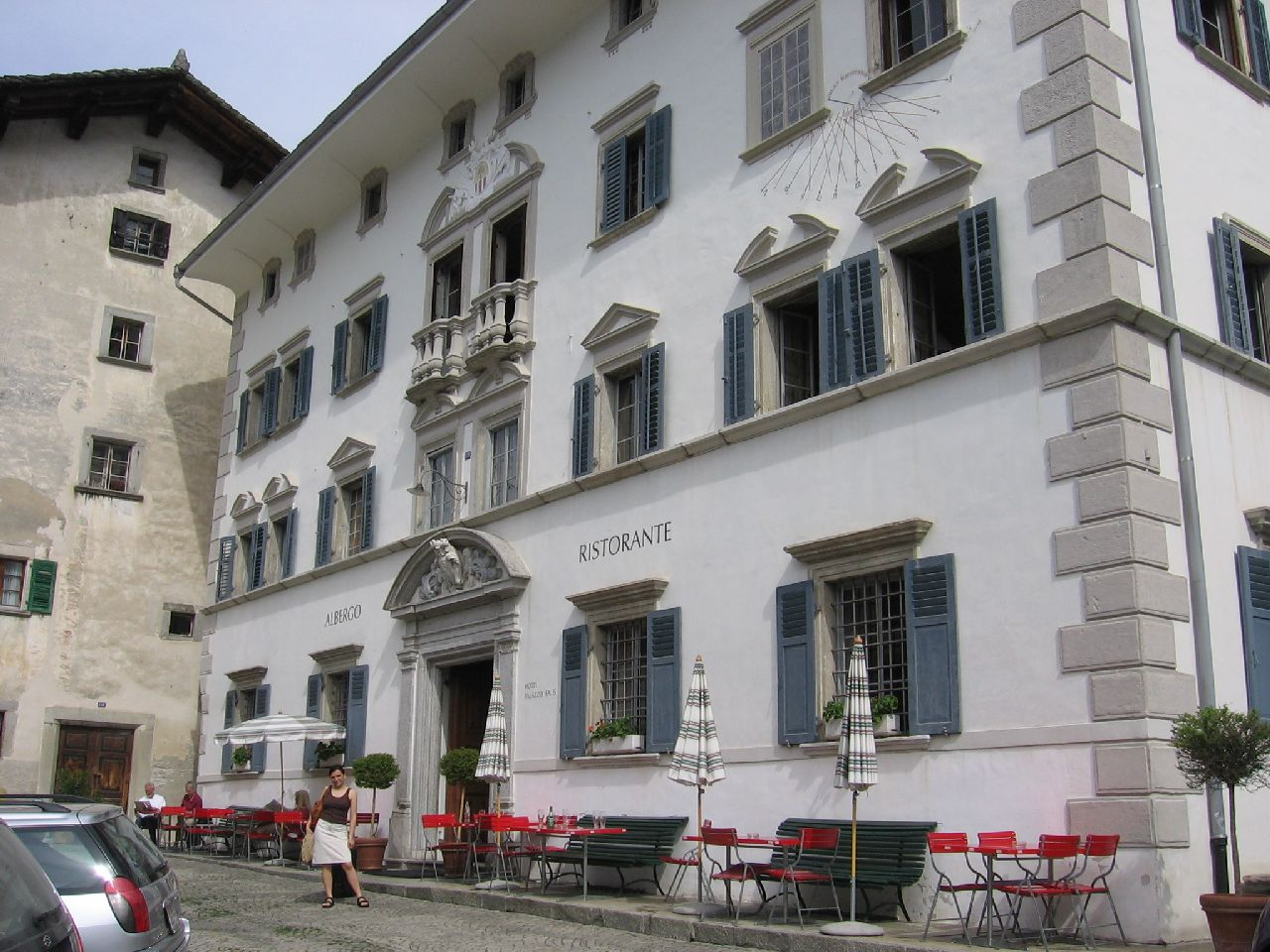 Hotel Palazzo Salis in Soglio, Graubunden, Switzerland